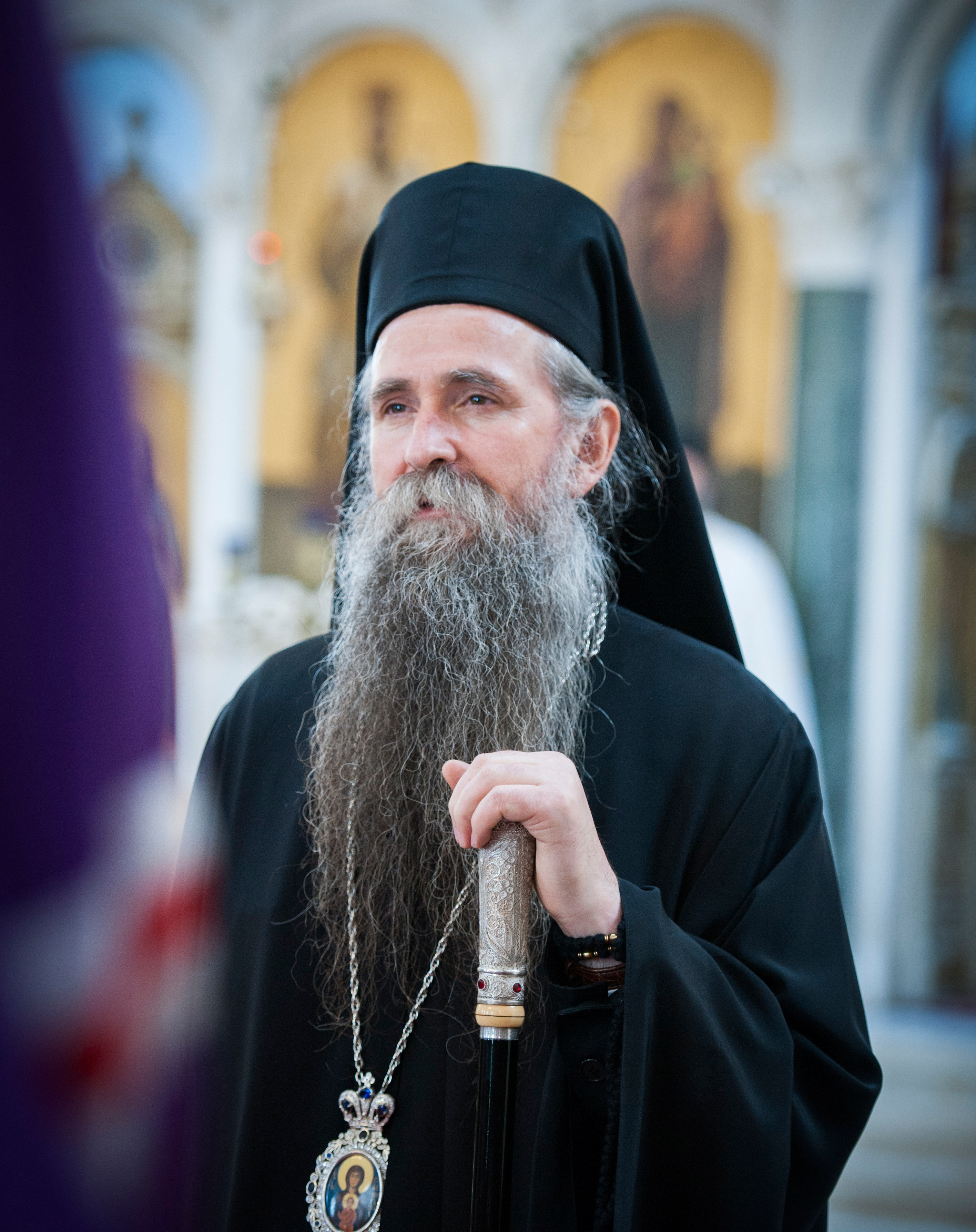 7 мая 2014, Доксология / 7 May 2014, Doxology